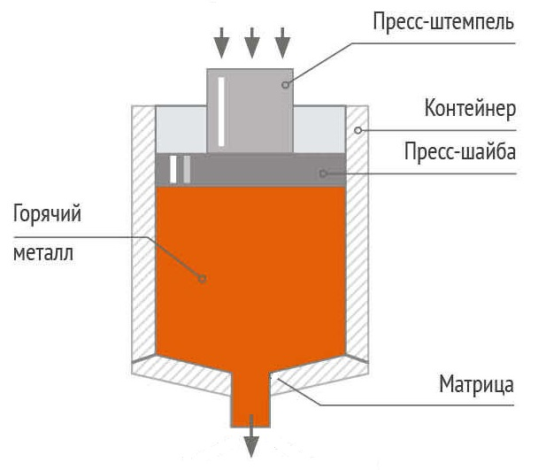 Прессованием называют процесс выдавливания помещенной контейнер заготовки через отверстие в матрице усилием пресс-штемпеля, снабженного пресс-шайбой